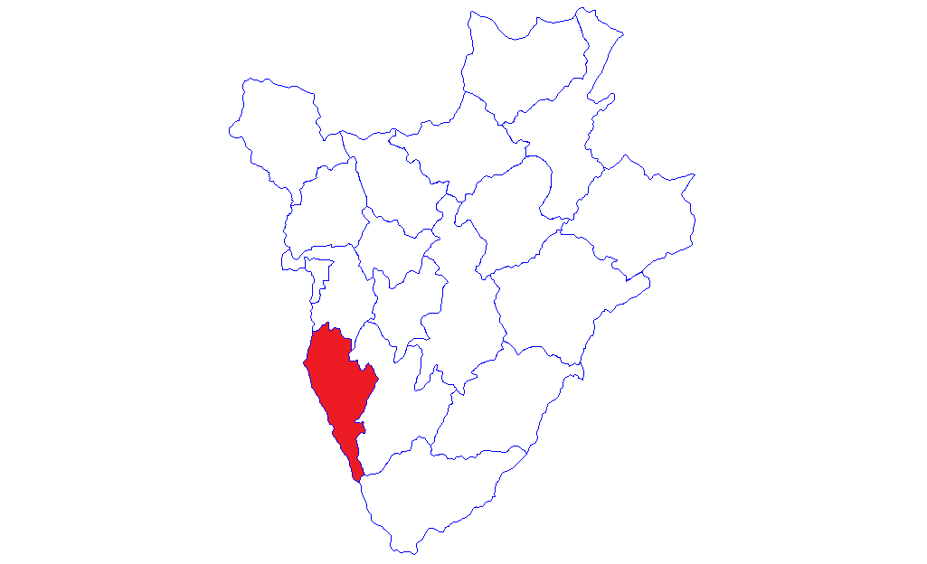 ブルンジ・ルモンゲ県の地図。